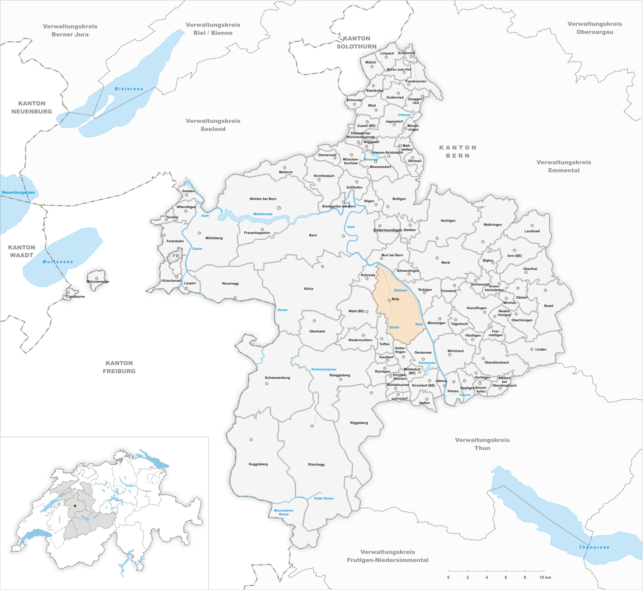 Municipality Belp